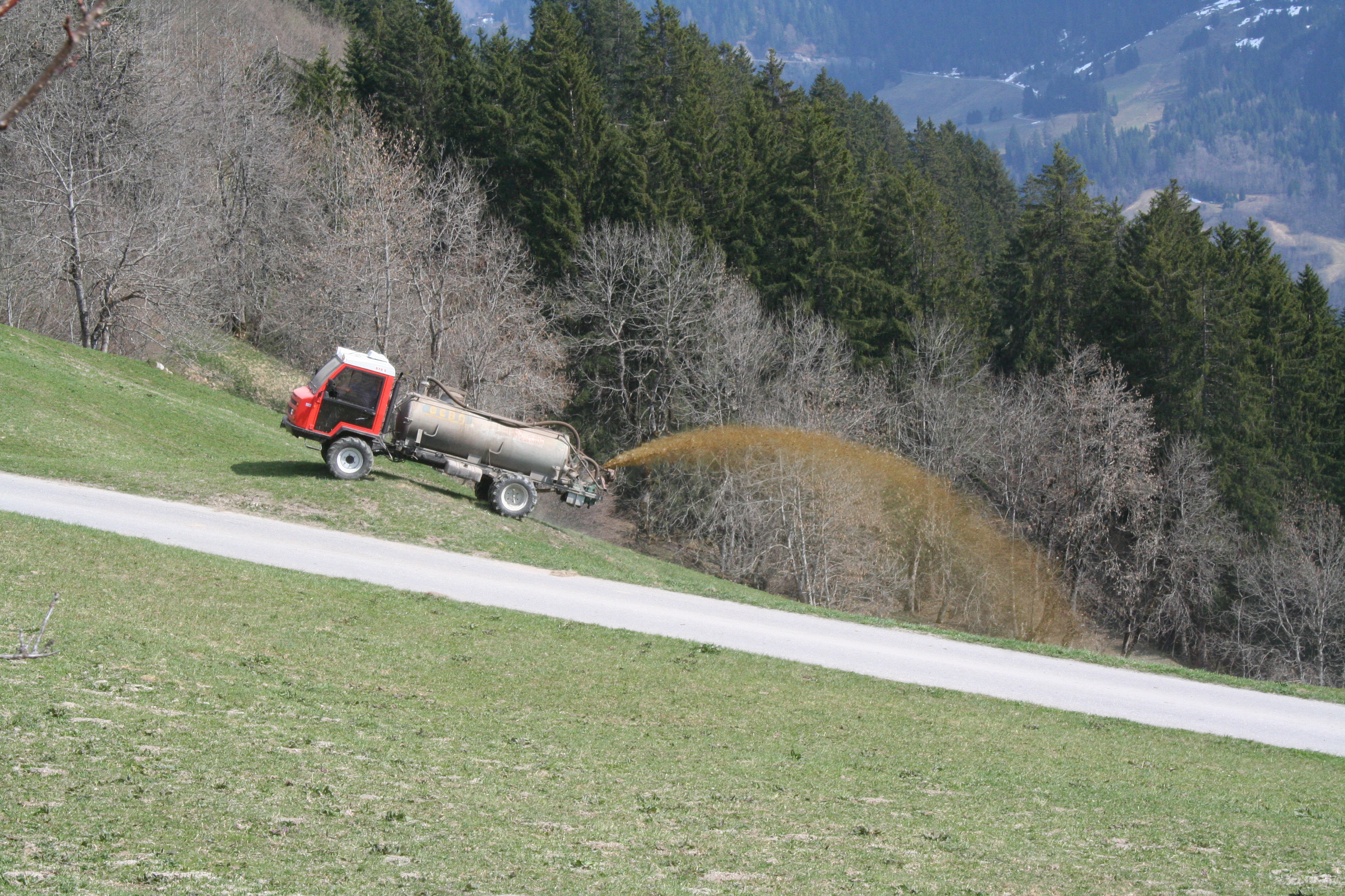 Güllefahren mit Reform-Transporter Muli 575 G und aufgebautem Geba-Güllefass in Falera, Schweiz